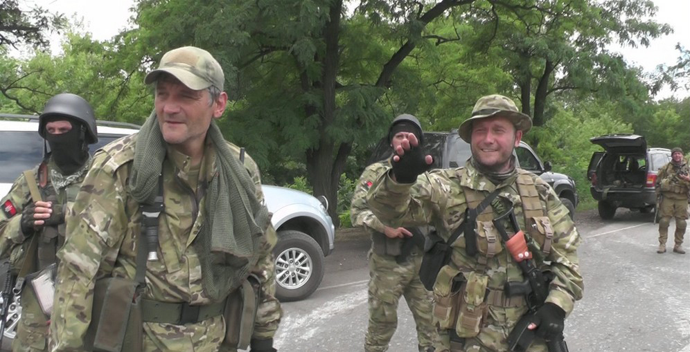 Правий сектор у бою під Карлівкою, Донецька область.